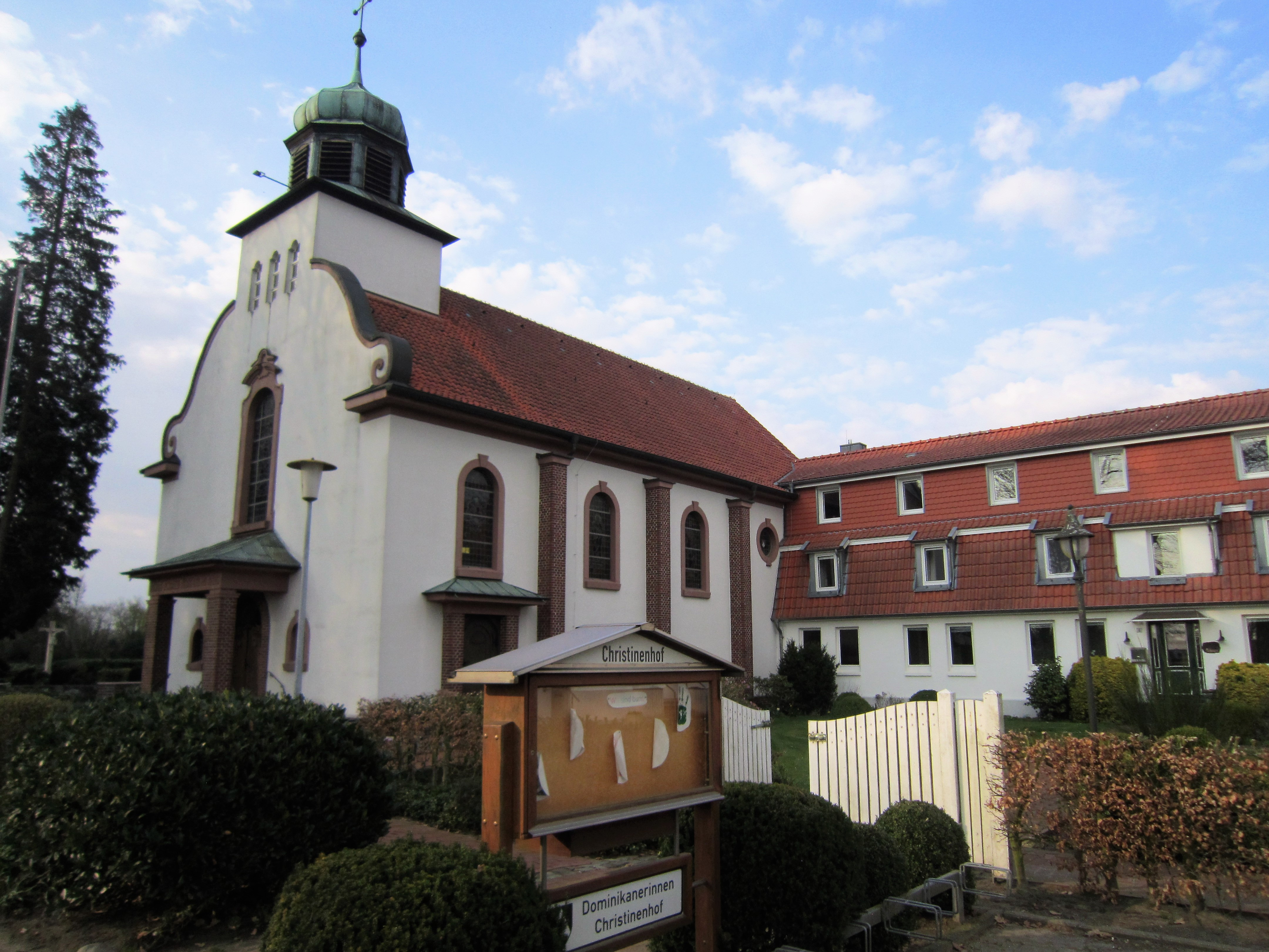 Ehemaliges Kloster "Christinenhof" der Dominikanerinnen (1929 bis 2015) in Schwichteler (Gemeinde Cappeln/Oldenburg, Landkreis Cloppenburg, Niedersachsen), von der Zufahrt zur Anlage aus aufgenommen. Im Wohntrakt sind seit 2016 unbegleitetete minderjährige Flüchtlinge untergebracht.